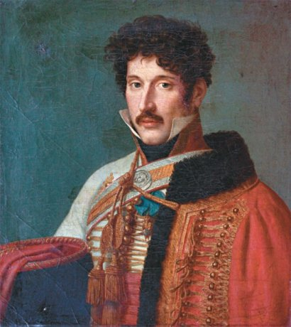 Portrait du général Charles Antoine Manhès (1777-1854)